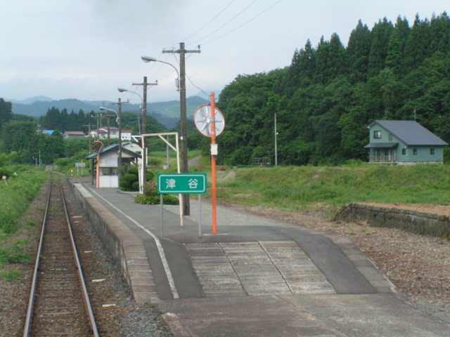 Tsuya Station, Tozawa, Yamagata, Japan